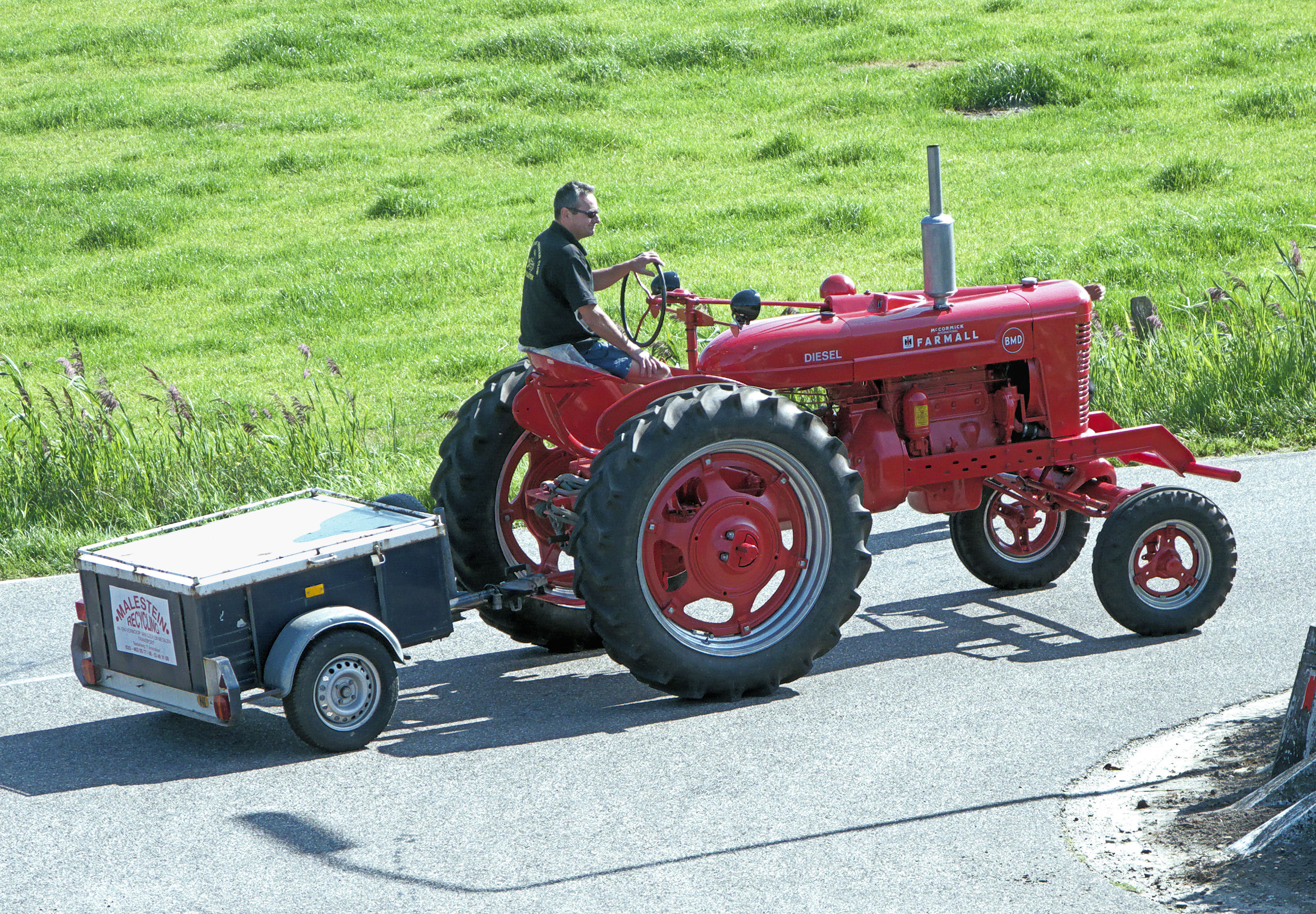 Tractor Farmall BMD